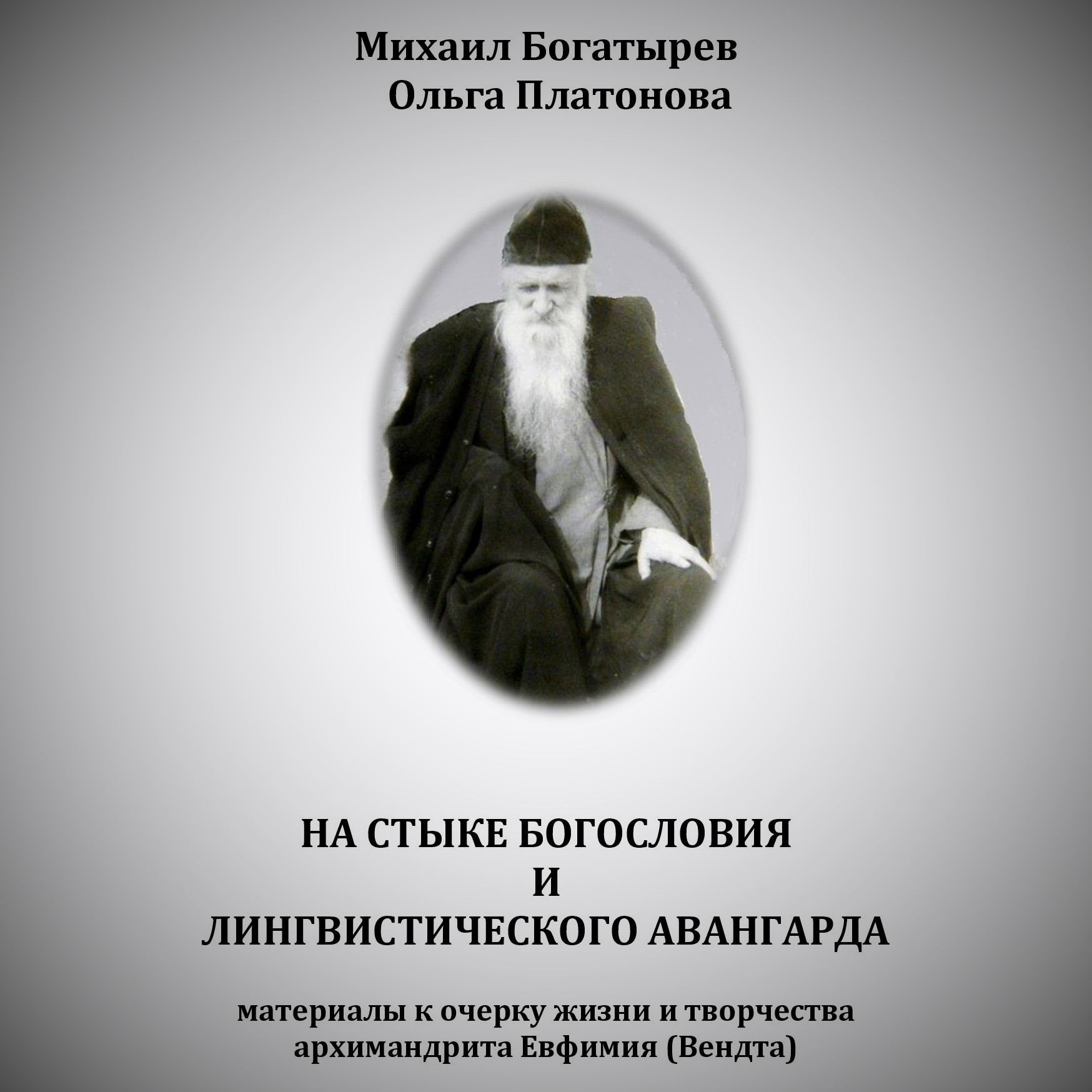 Обложка второй книги об арх. Евфимии